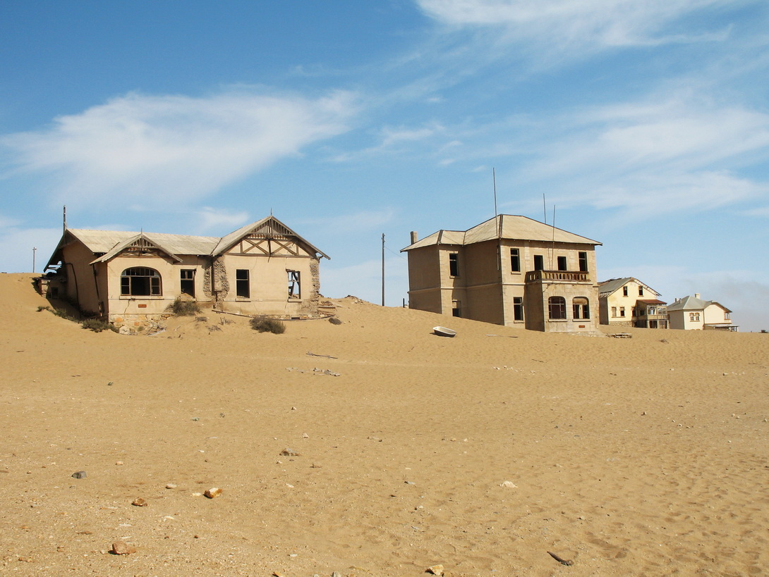 Geisterstadt Kolmannskuppe, Diamanten-Sperrgebiet